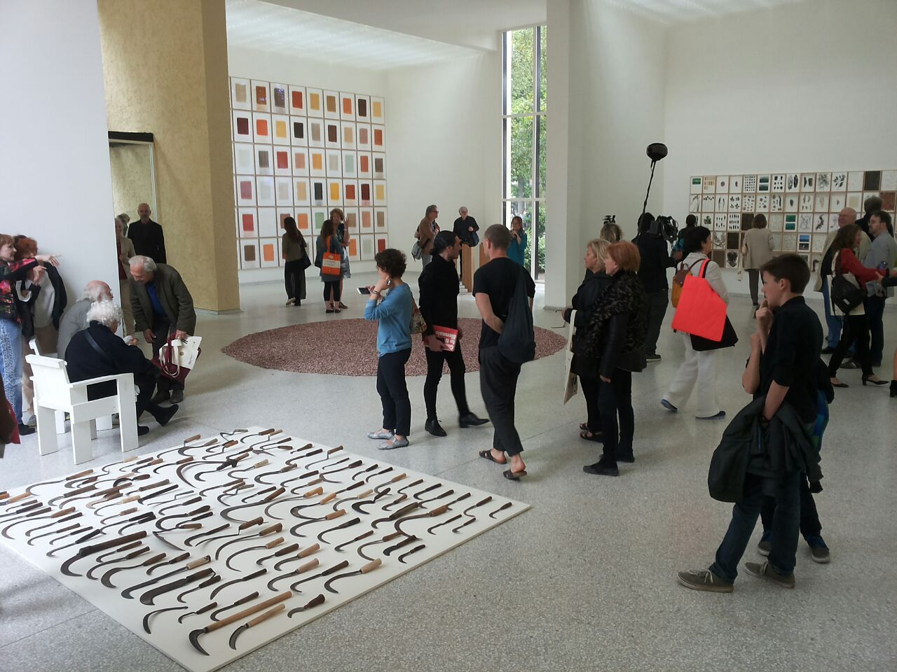 Tentoonstelling 'to be all ways to be' van herman de vries op de Biënnale van Venetië 2015 in het Rietveldpaviljoen tijdens de opening op 6 mei 2015. Geheel links op de foto de kunstenaar (zittend). Links op de voorgrond: sicheln, 2014 (sikkels) Midden: rosa damascena, 2004-2015 Links op de achtergrond: from earth,2014-2015 Rechts: from the laguna of venice - a journal, 2014-2015